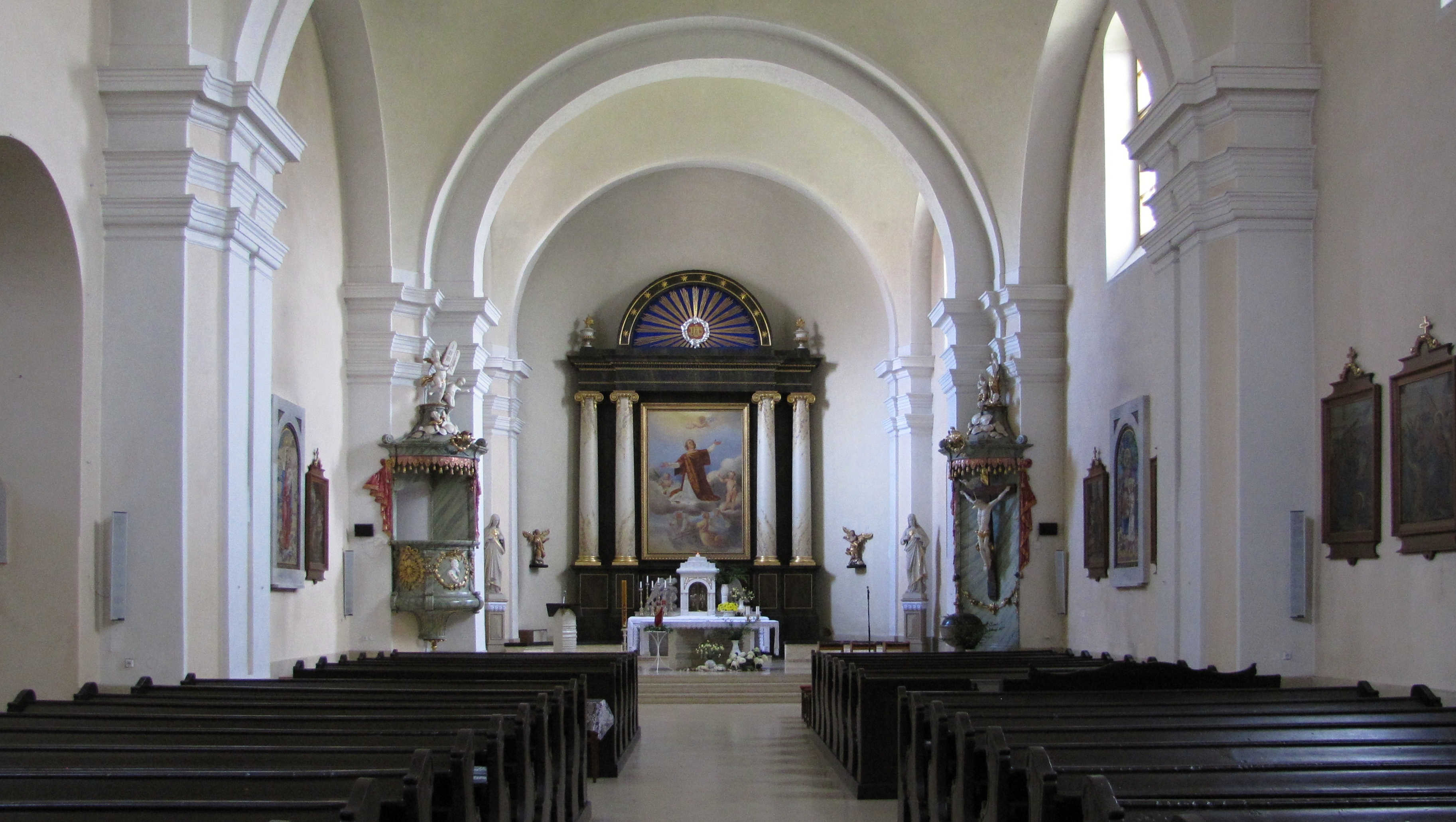 Kostel svatého vavřince v Hodoníně, interiér